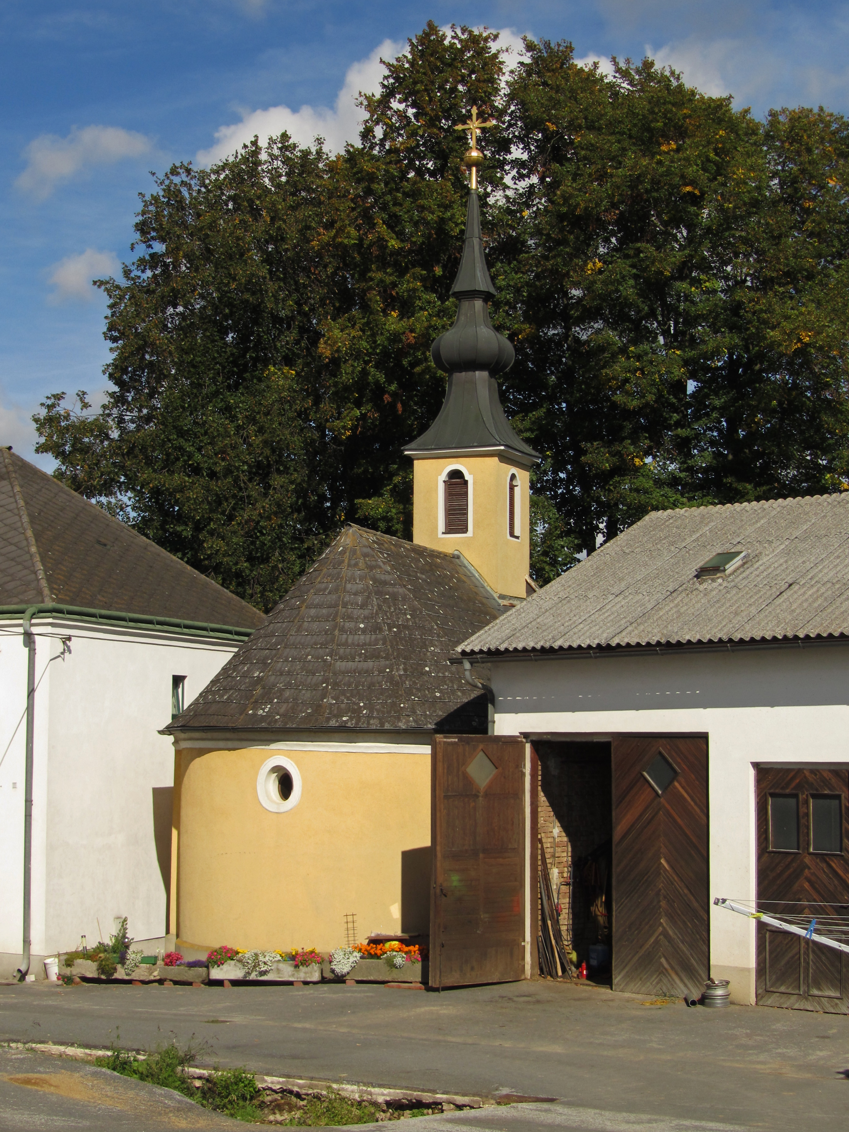 1756/61 erbaute, 1775 und 1857 nach Bränden erneuerte Barockkapelle.